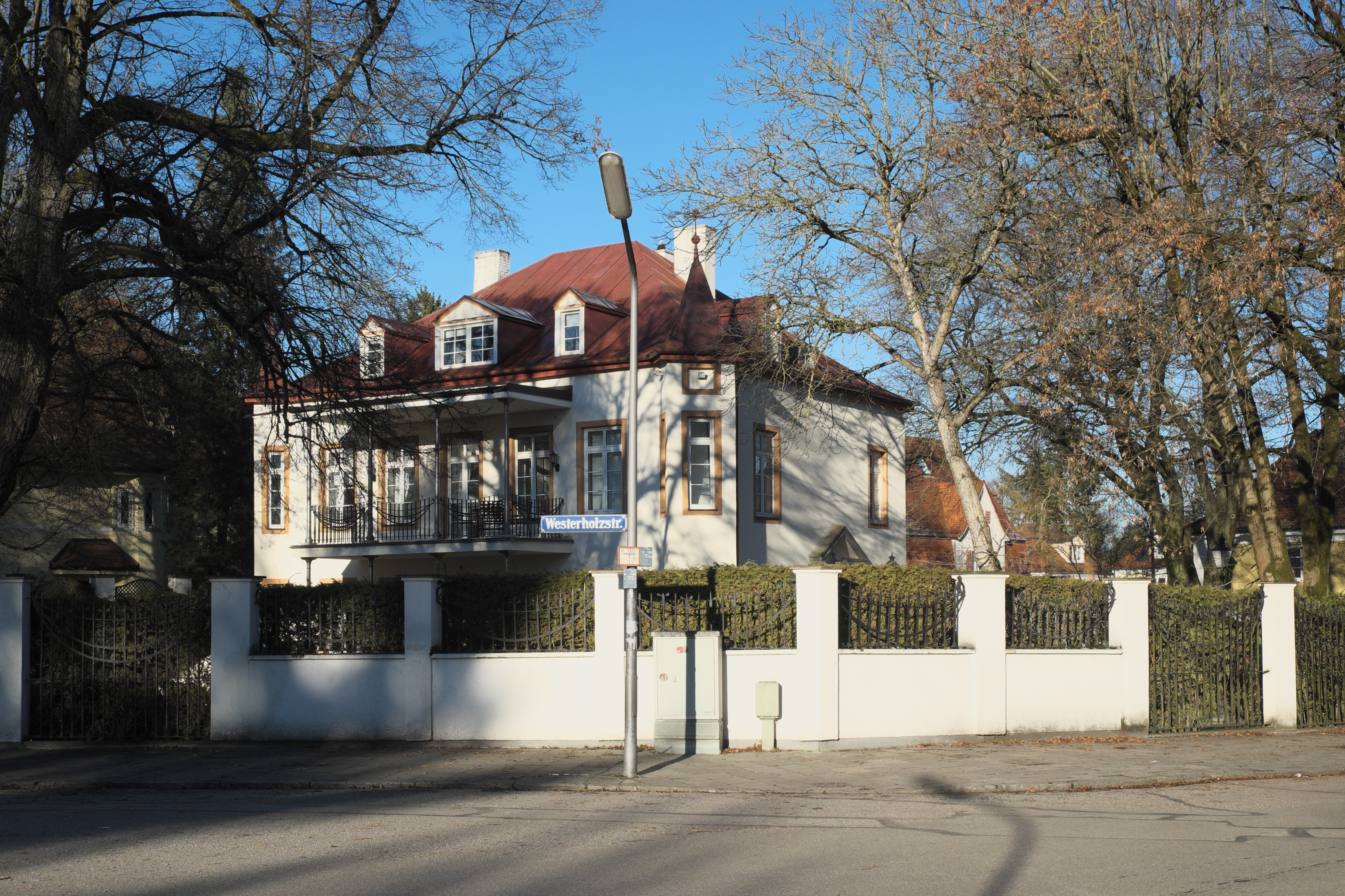 Landhaus in der Grandlstraße 68 in Obermenzing im Stadtbezirk Pasing-Obermenzing in München (Bayern/Deutschland), 1895/1900 erbaut